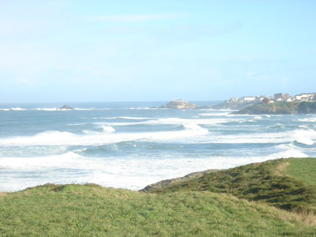 Tapia de Casariego visto desde los acantilados de Serantes.